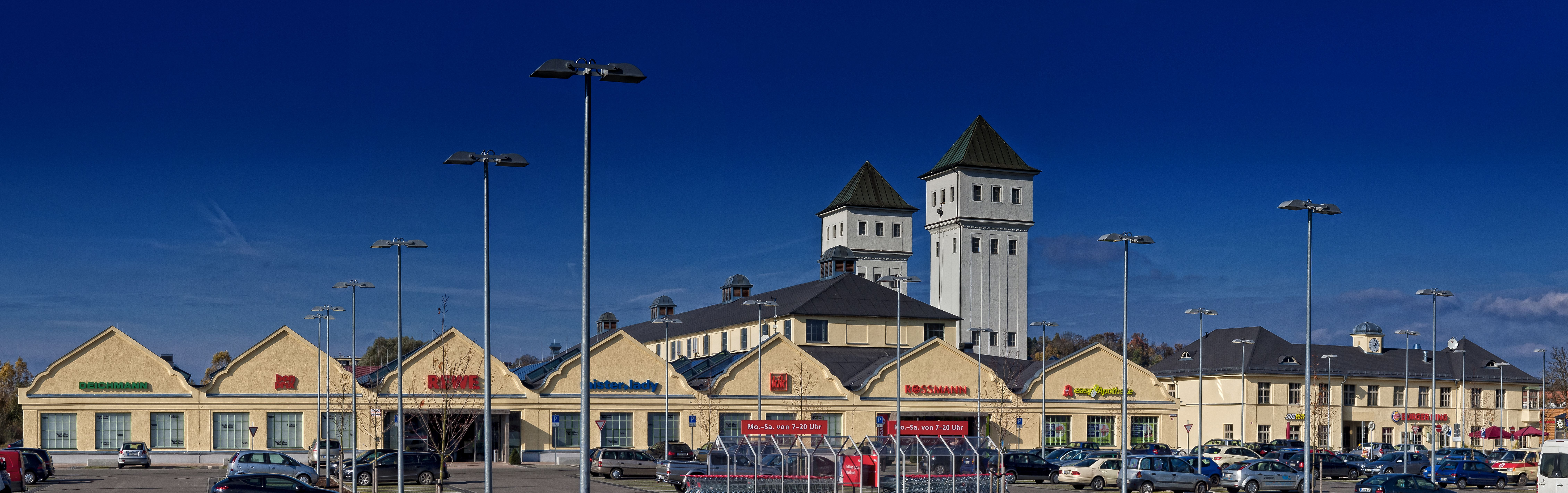 Ehemaliges Schlüterwerk in Freising